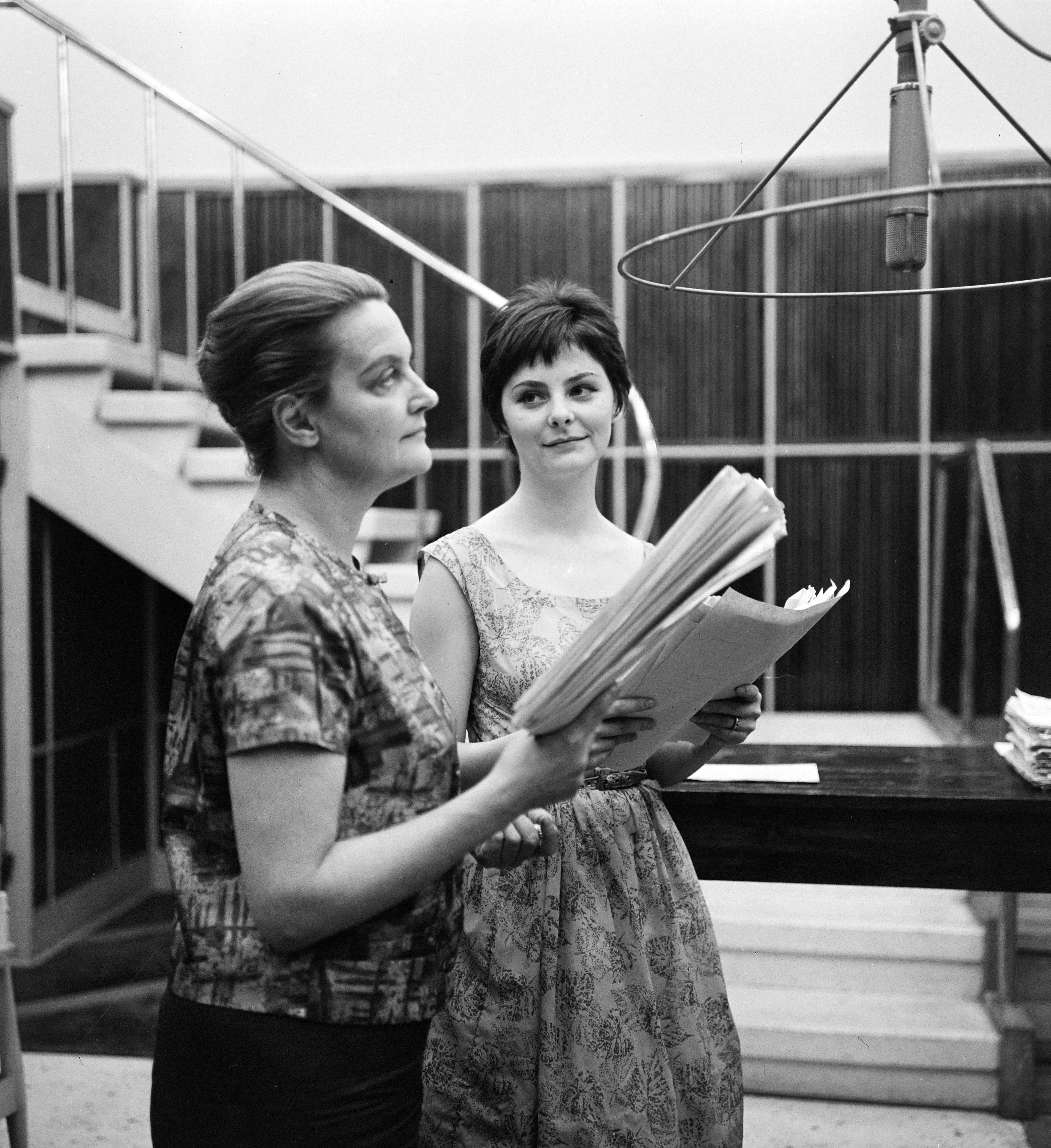 Tolnay Klári és Béres Ilona Szakonyi Károly Az út mellett című rádiójátékának felvételekor, a Magyar Rádió 20-as stúdiójában